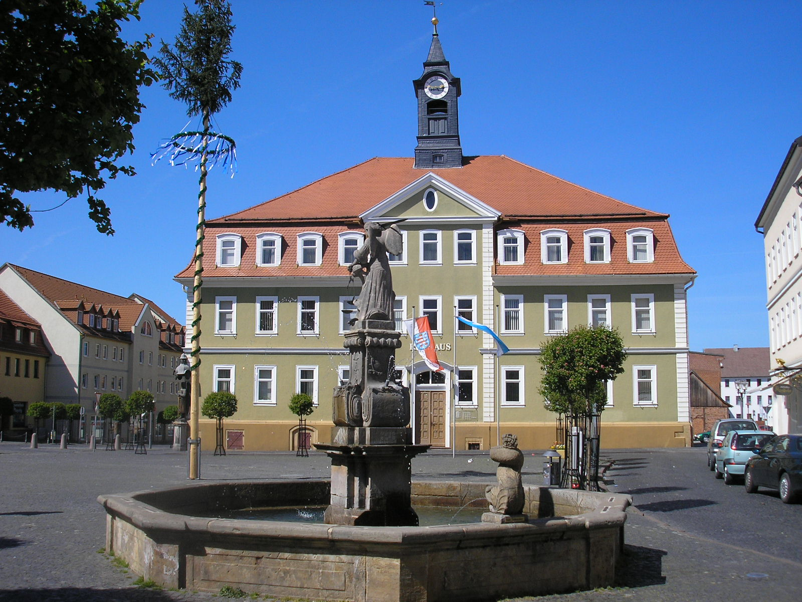 Das Rathaus in Ohrdruf (Thüringen)